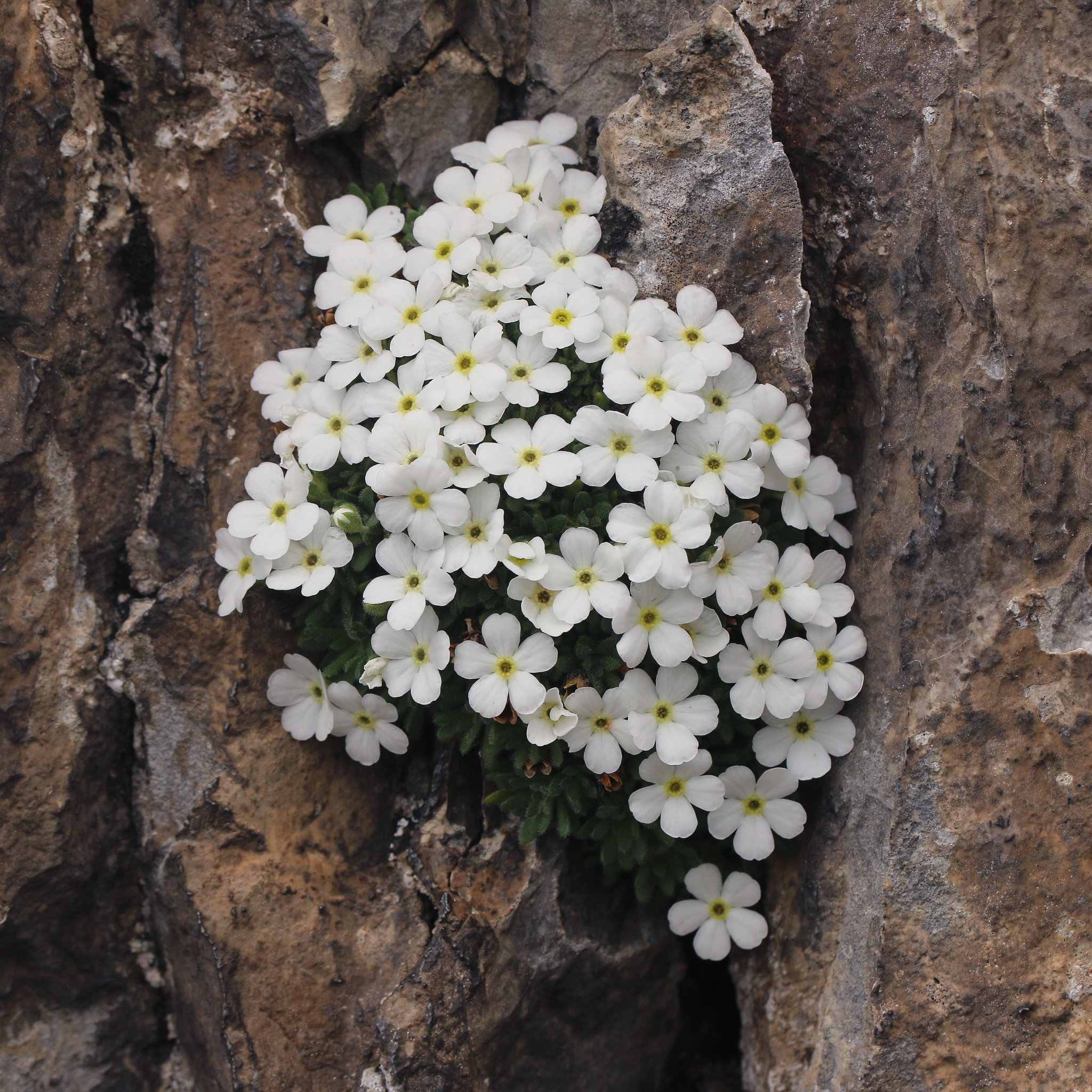 Androsace cylindrica subsp. hirtella, La Pierre Saint-Martin, France